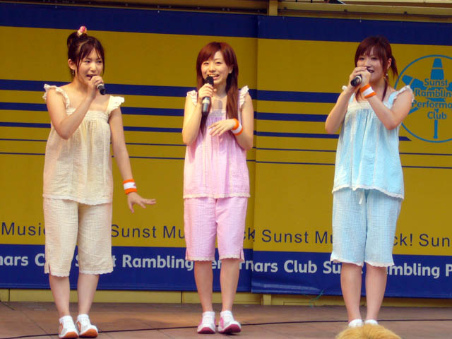 Tagalog: kuha ko ng bandang MUH~ sa isa sa mga live nilang pagtatanghal